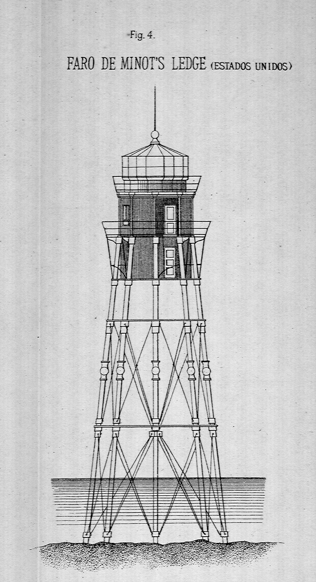 Faro de Minot's Ledge según dibujo de José Eugenio Ribera